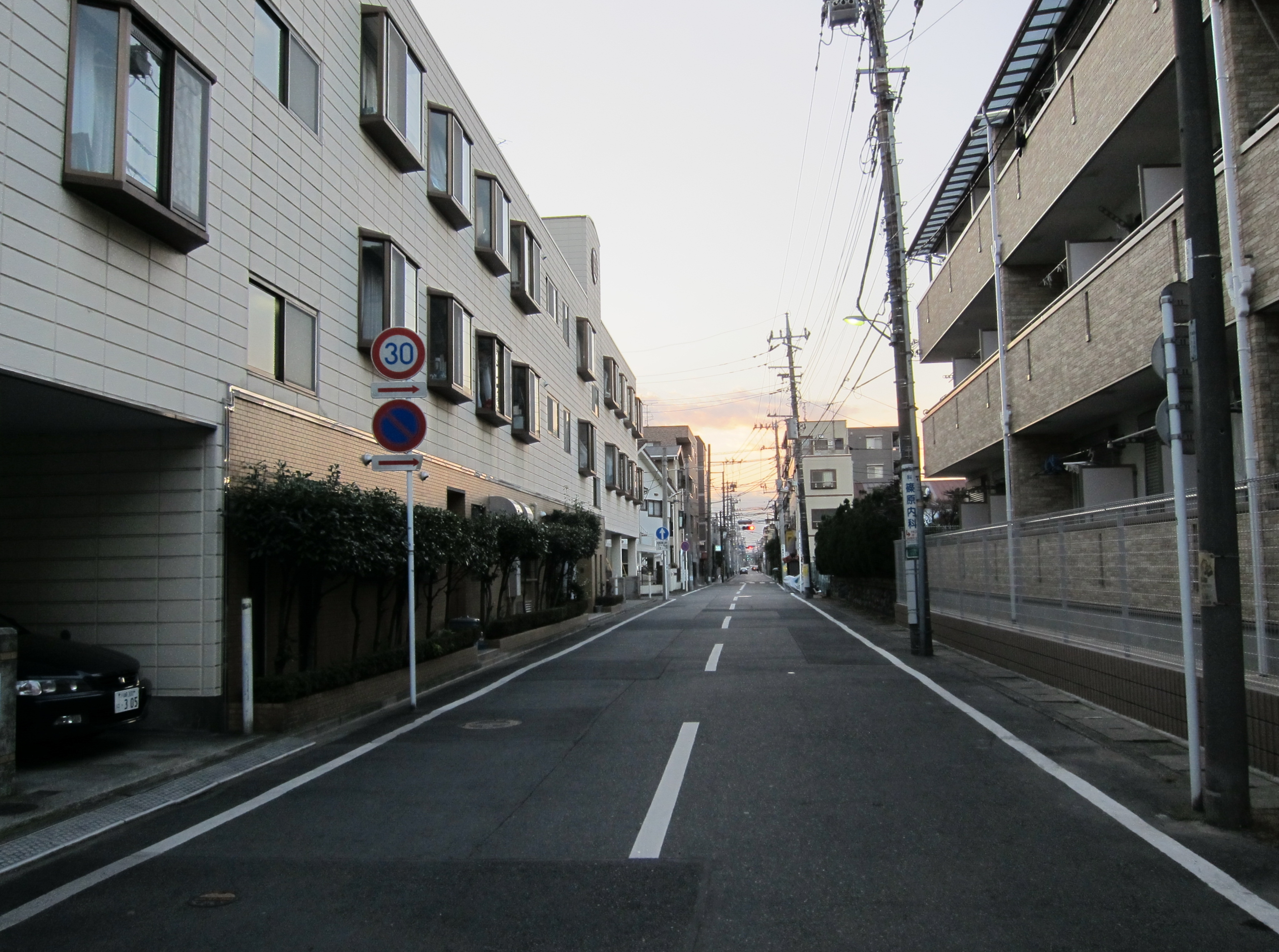 Motosumiyoshi , Kawasaki